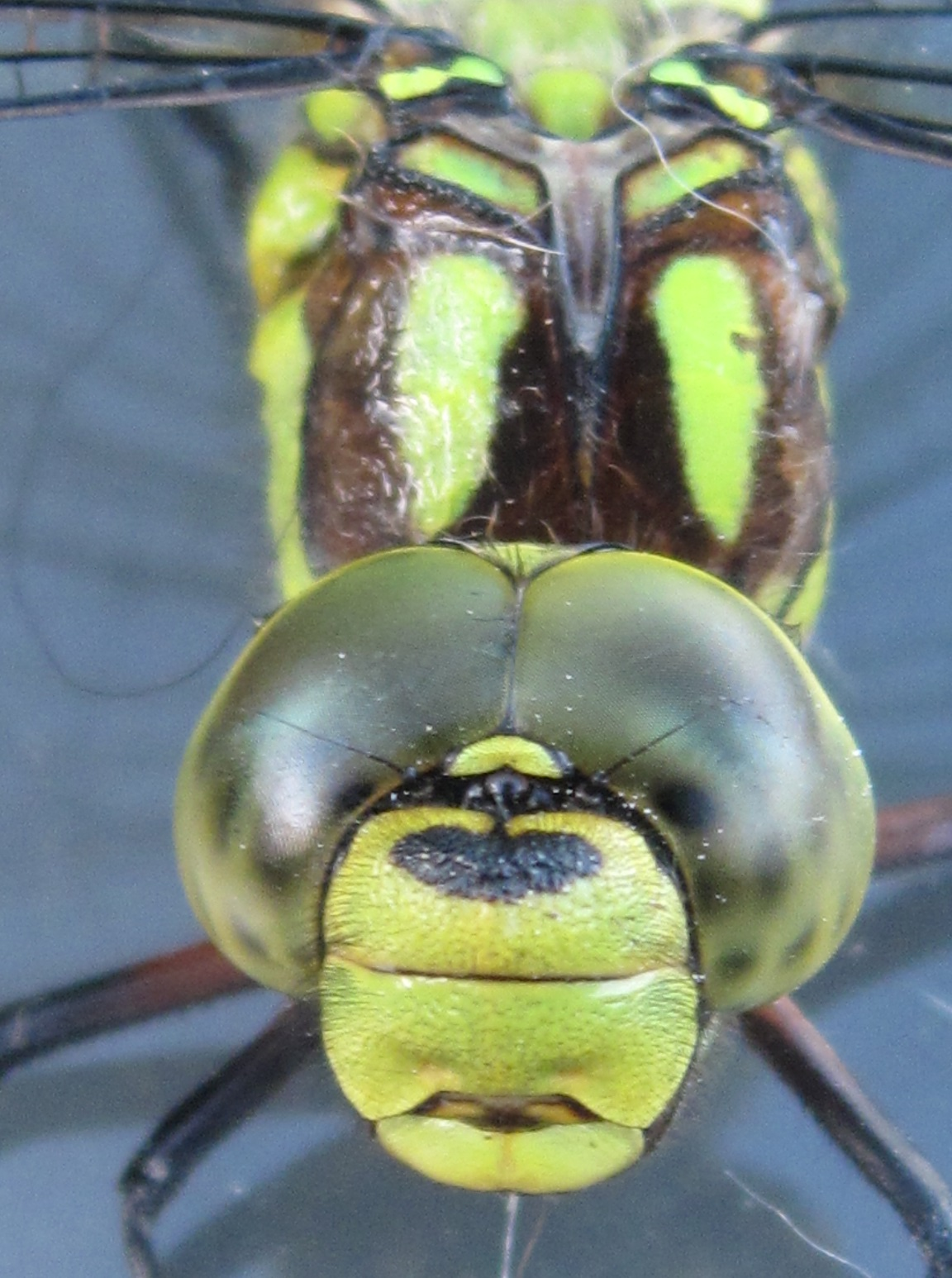 Tête grossie de la libellule Aeshne bleue